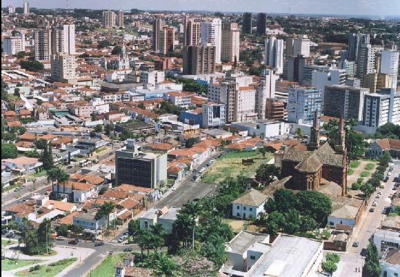 Uberaba, foto tirada do bairro boa vista sob minha autoria pois eu mesmo a tirei